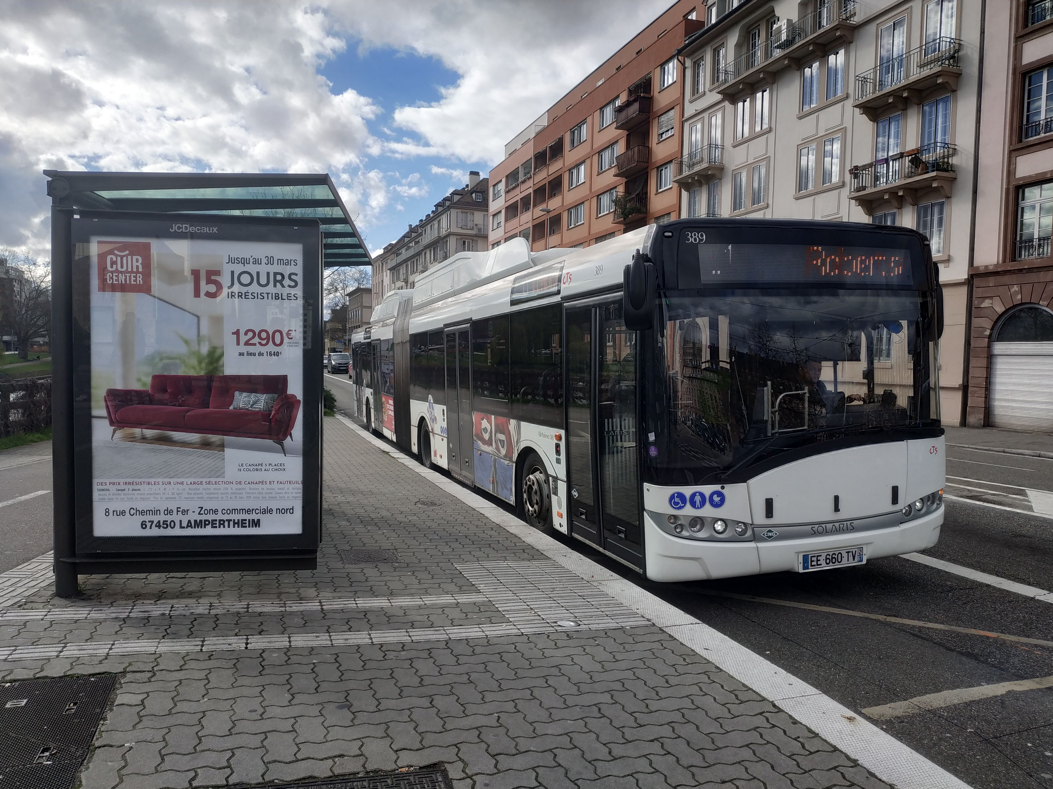 Solaris Urbino 18 GNC n°389 sur la ligne L1 du réseau CTS de Strasbourg